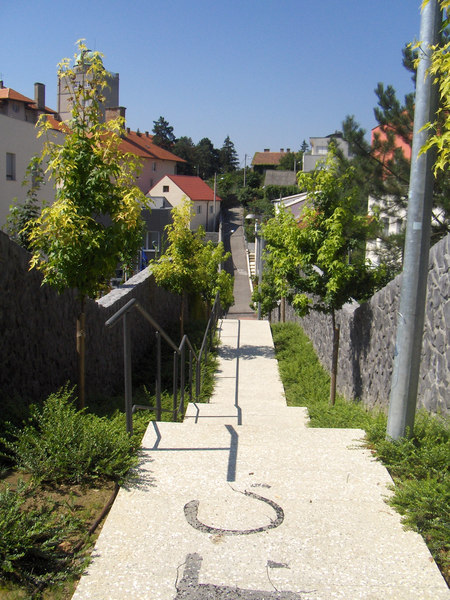 New development along Babonićeva Street in Šalata, Zagreb